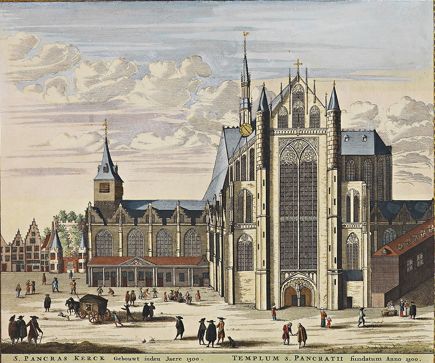 St Pancraskerk van Leiden uit het Stedenboek van Frederick de Wit. Cultural property Hooglandse Kerk, Leiden, South Holland, Netherlands Q1537970, Rijksmonument ID: 24917 BabelNet ID: 01856920n